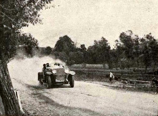 Rajd Polski 1930 - Jerzy Żochowski jadący samochodem Delage podczas górskiej próby szybkościowej